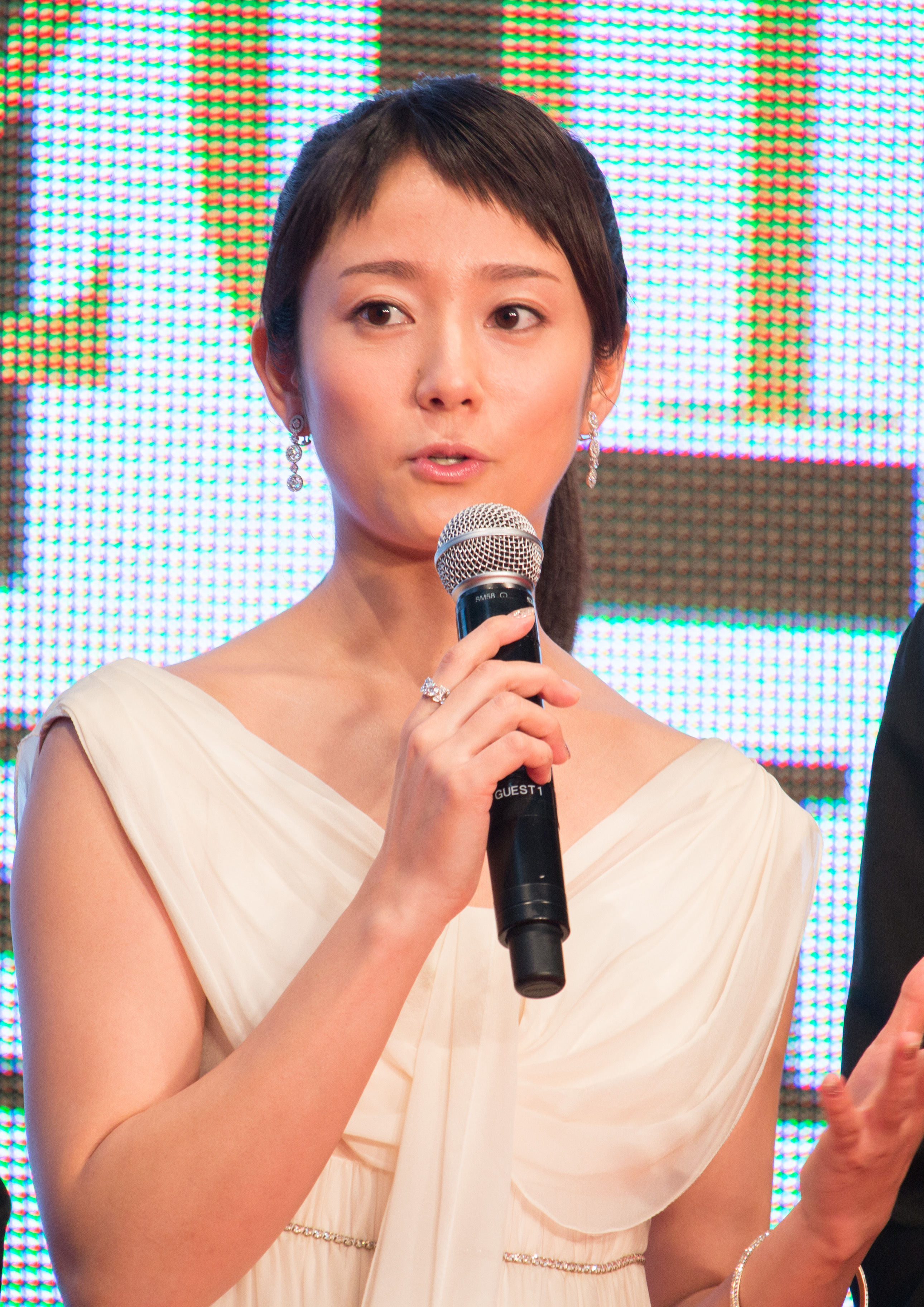 第28回 東京国際映画祭 オープニングセレモニー 笑福亭鶴瓶 木村文乃 ジャック・クルーゾ(シーズンズ)